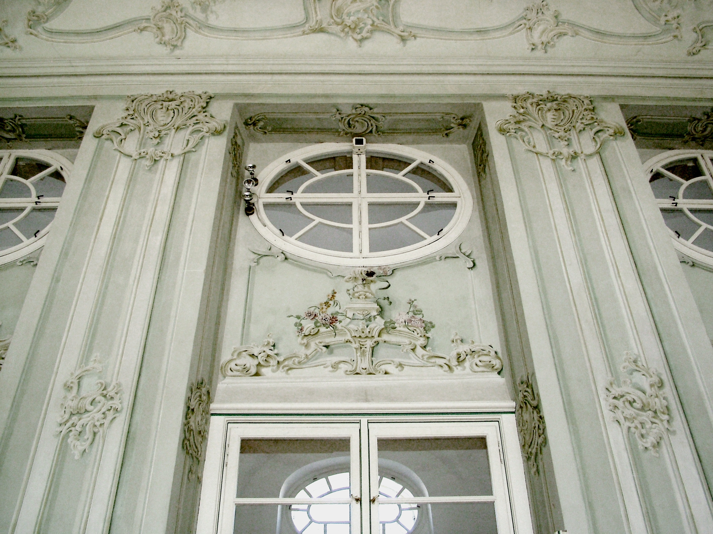 Halbturn (Féltorony): kastélybelső (Ausztria)